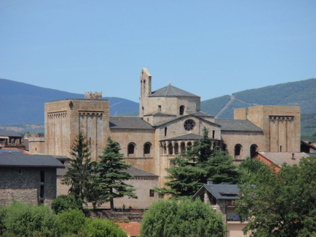 Catedral de Santa Maria (la Seu d'Urgell), vista des del Parc del Segre